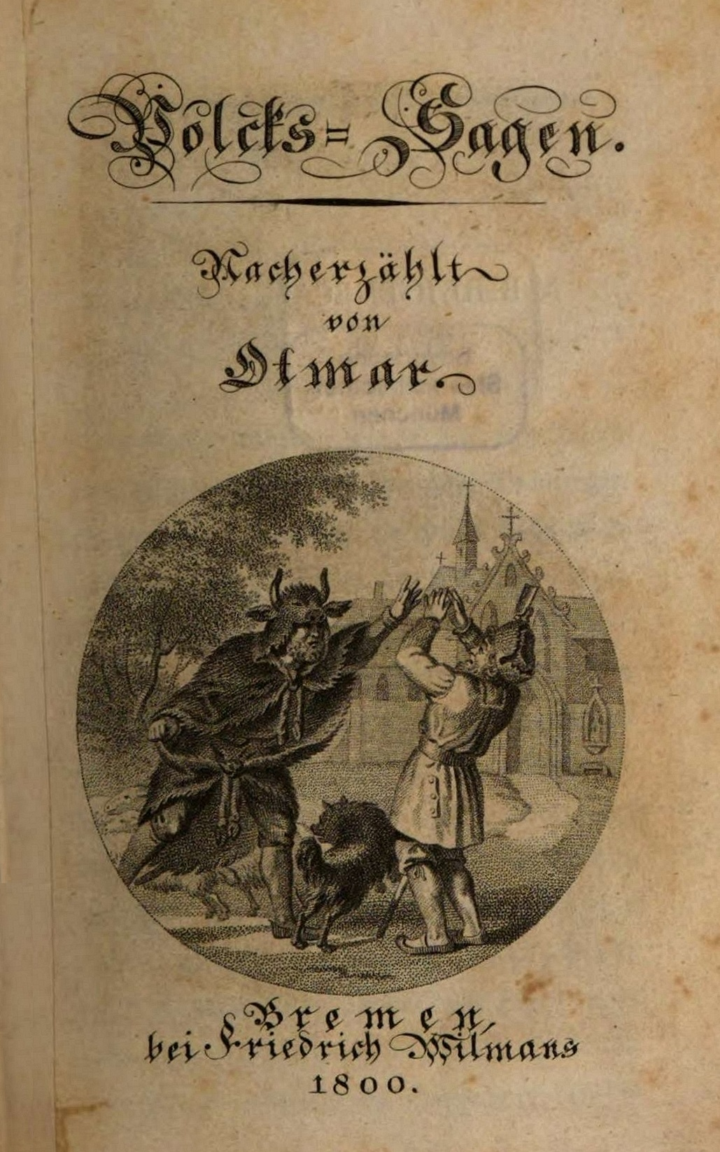 Otmar (Johann Carl Christoph Nachtigal): Volcks-Sagen, Bremen 1800, Titelseite